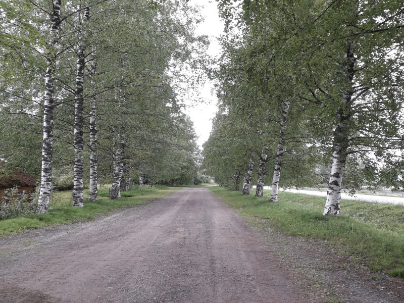 Березовая аллея в Пухосе